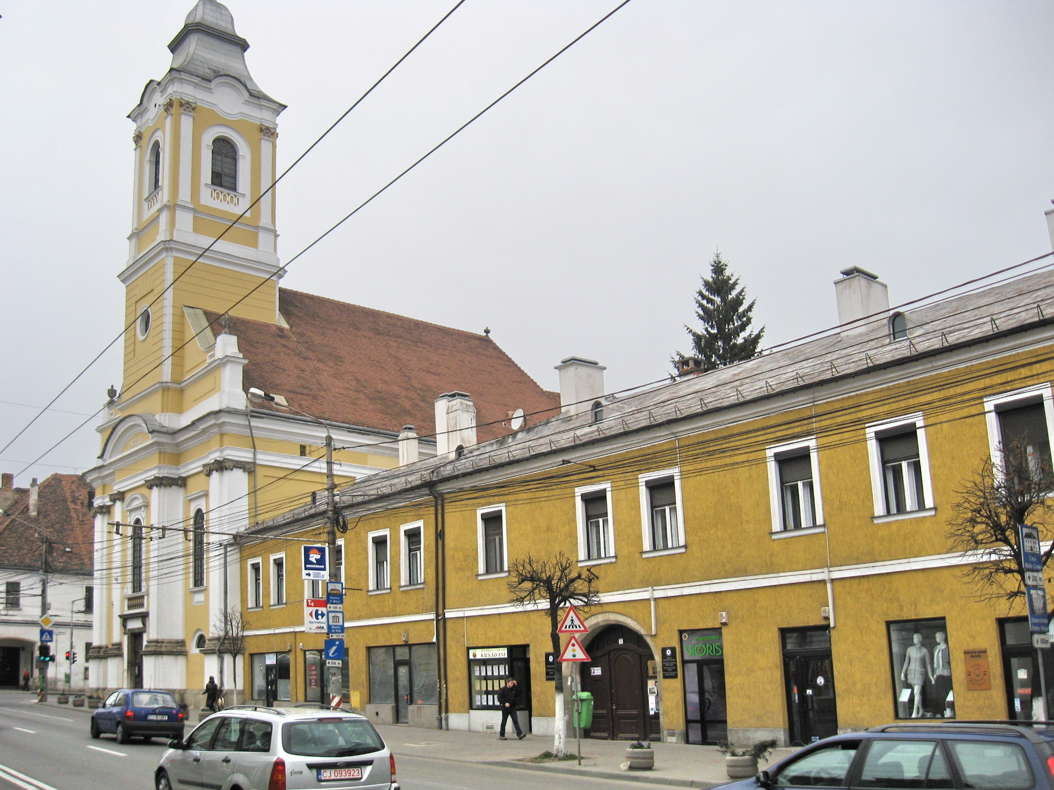 Cluj-Napoca, Biserica Evanghelică-Luterană Sinodo-Prezbiteriană (Bulev. 21 Decembrie 1989 nr.1)